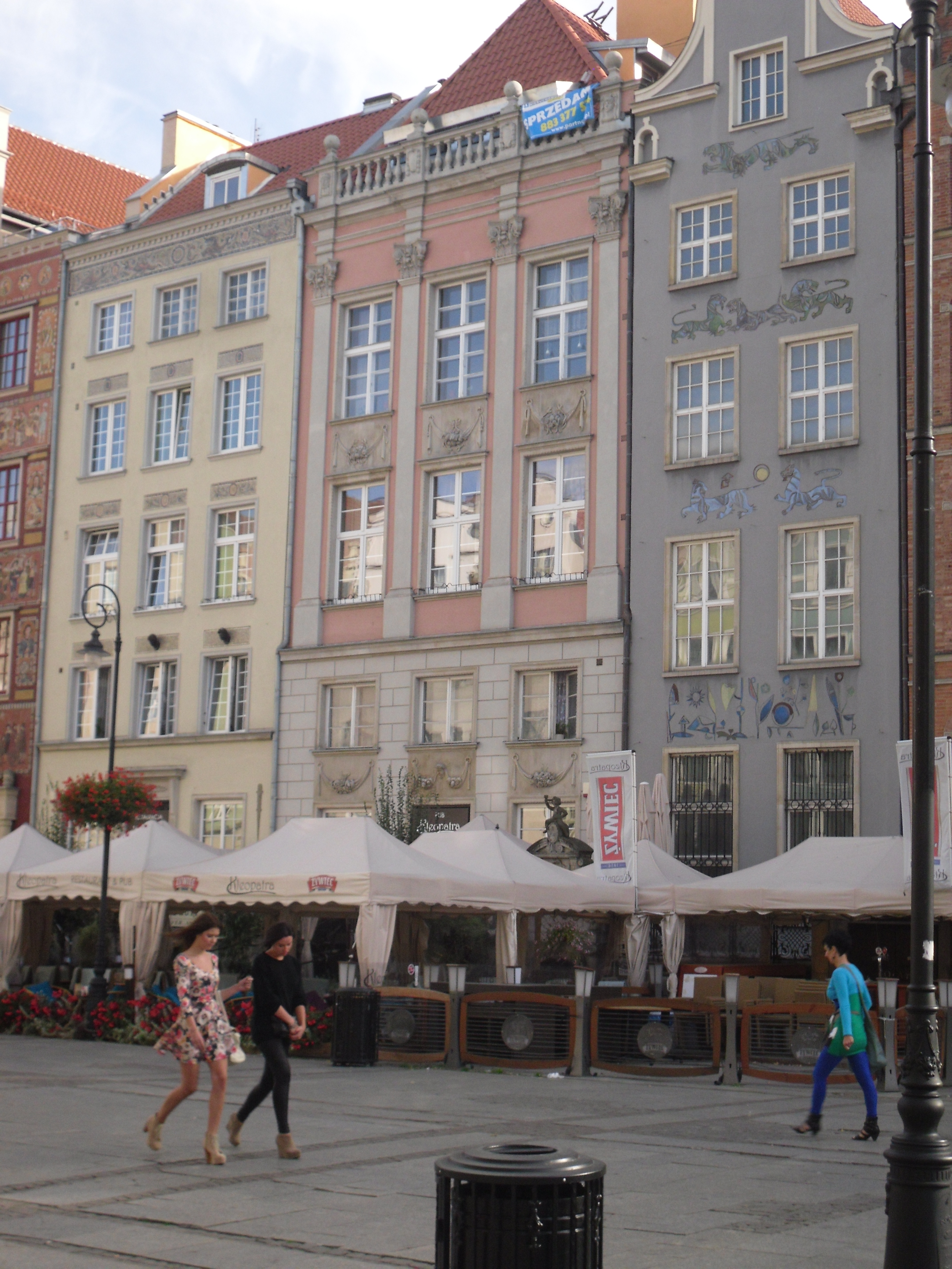 Gdańsk Główne Miasto - kamienice przy Długim Targu, od lewej 18, 17 i 16.